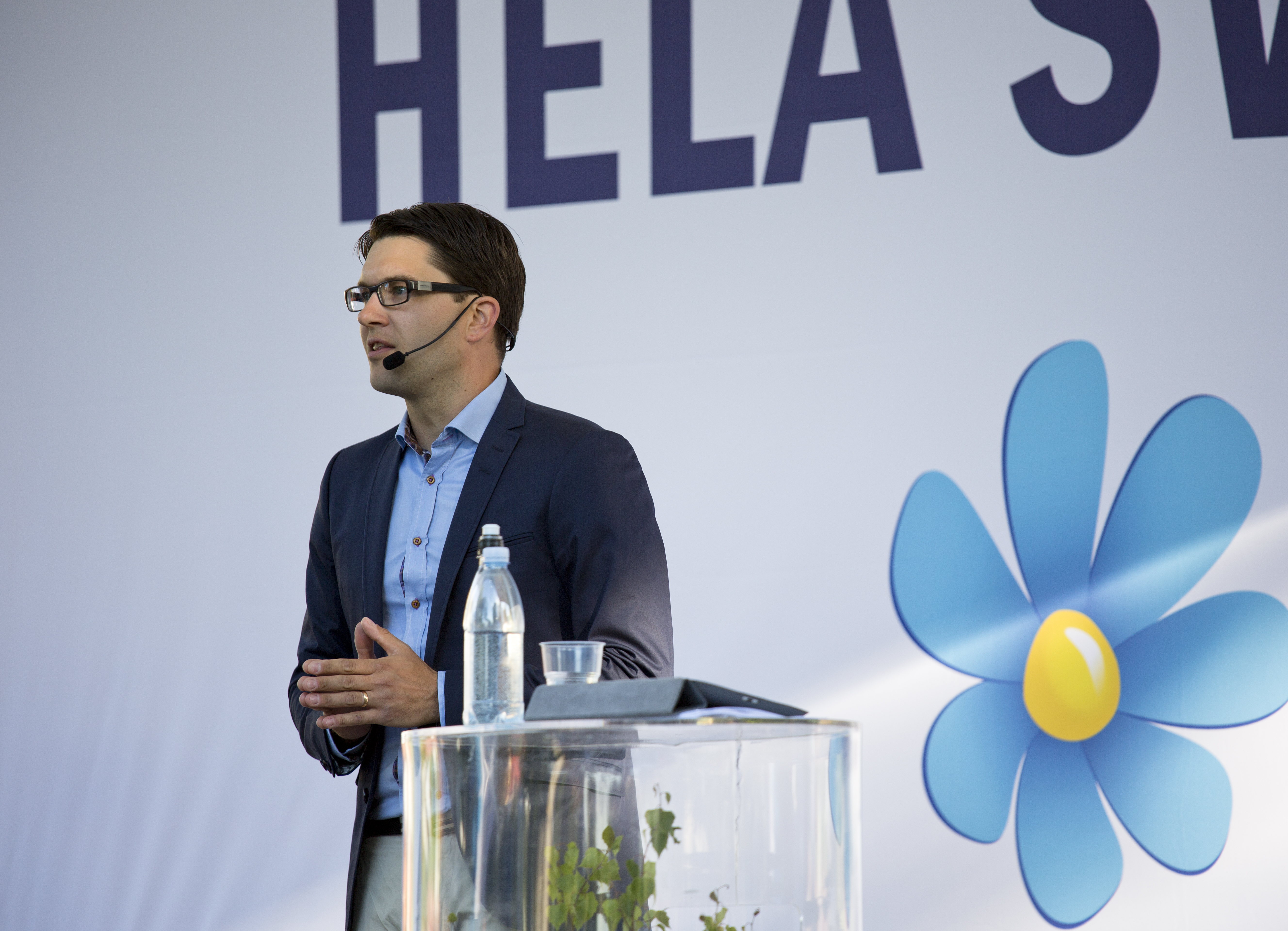 Jimmie Åkesson, Sverigedemokraternas partiledare, vid sitt partiledartal under politikerveckan i Almedalen kvällen den 1 juli 2013, Visby, Gotland, Sweden.